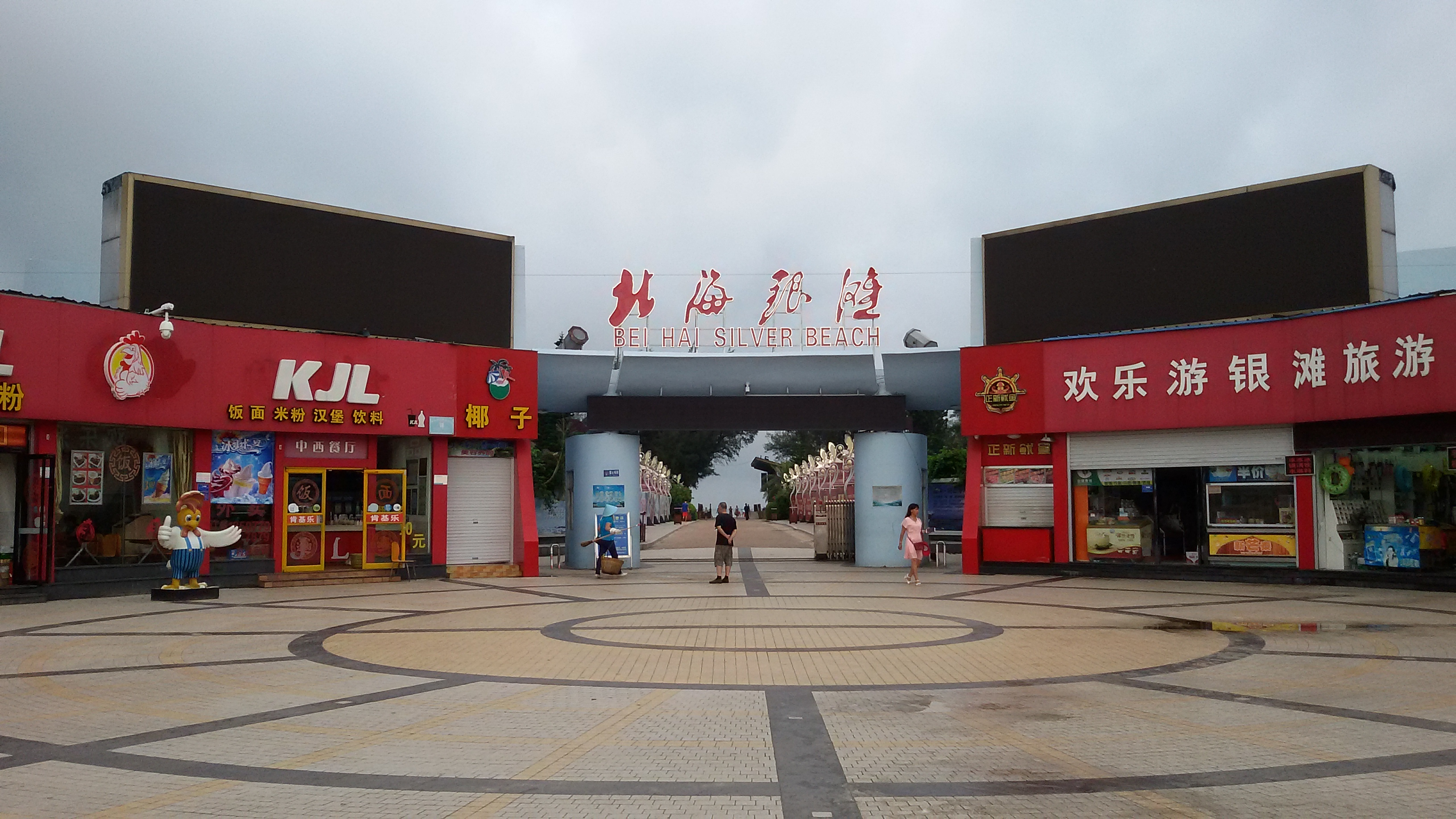 粵語: 北海银滩正门